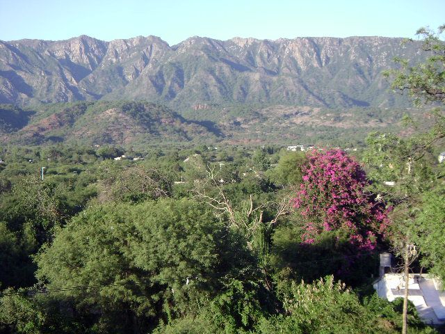 Vista de Olta, La Rioja. Argentina